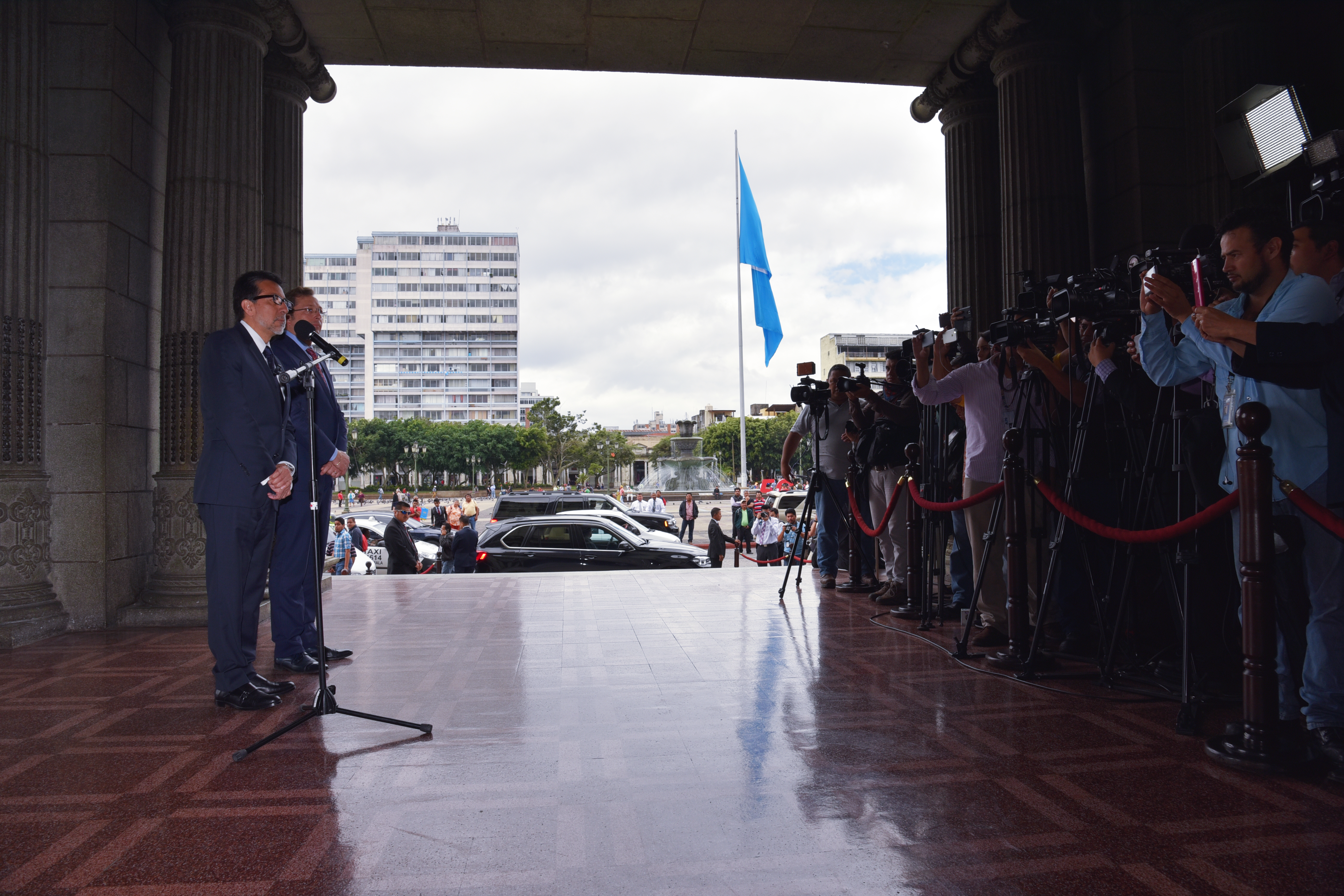 Conferencia de prensa del Embajador Arreaga y el Portavoz Heimann